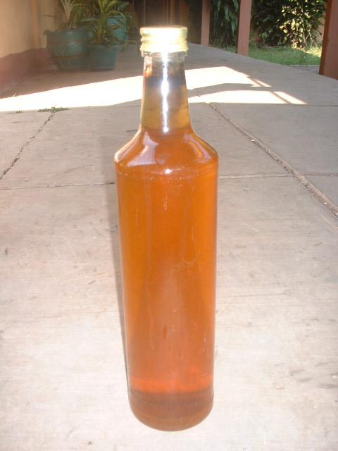 Asap cair tempurung kelapa